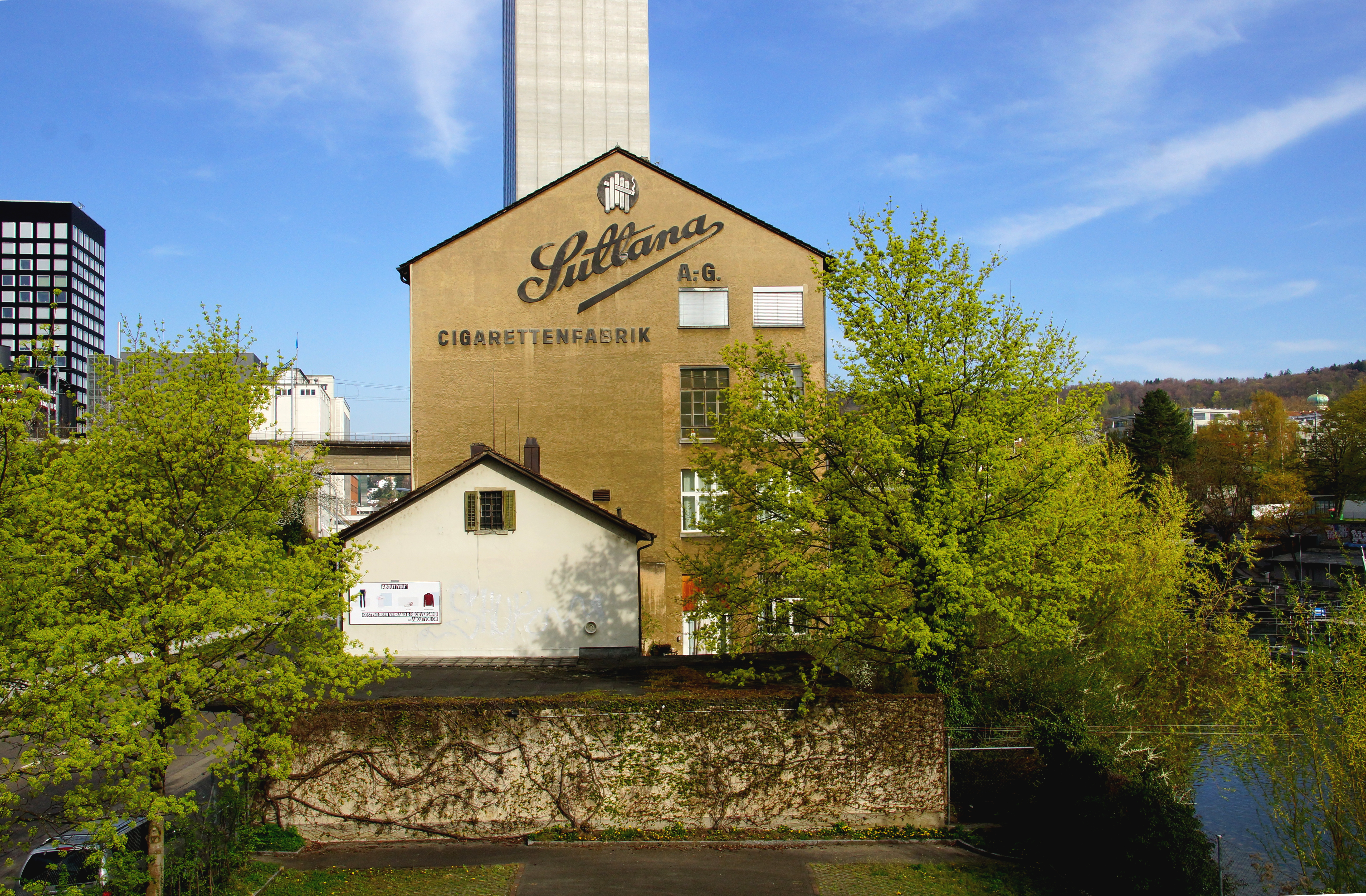 Sihlquai - Zigarettenfabrik Sullana